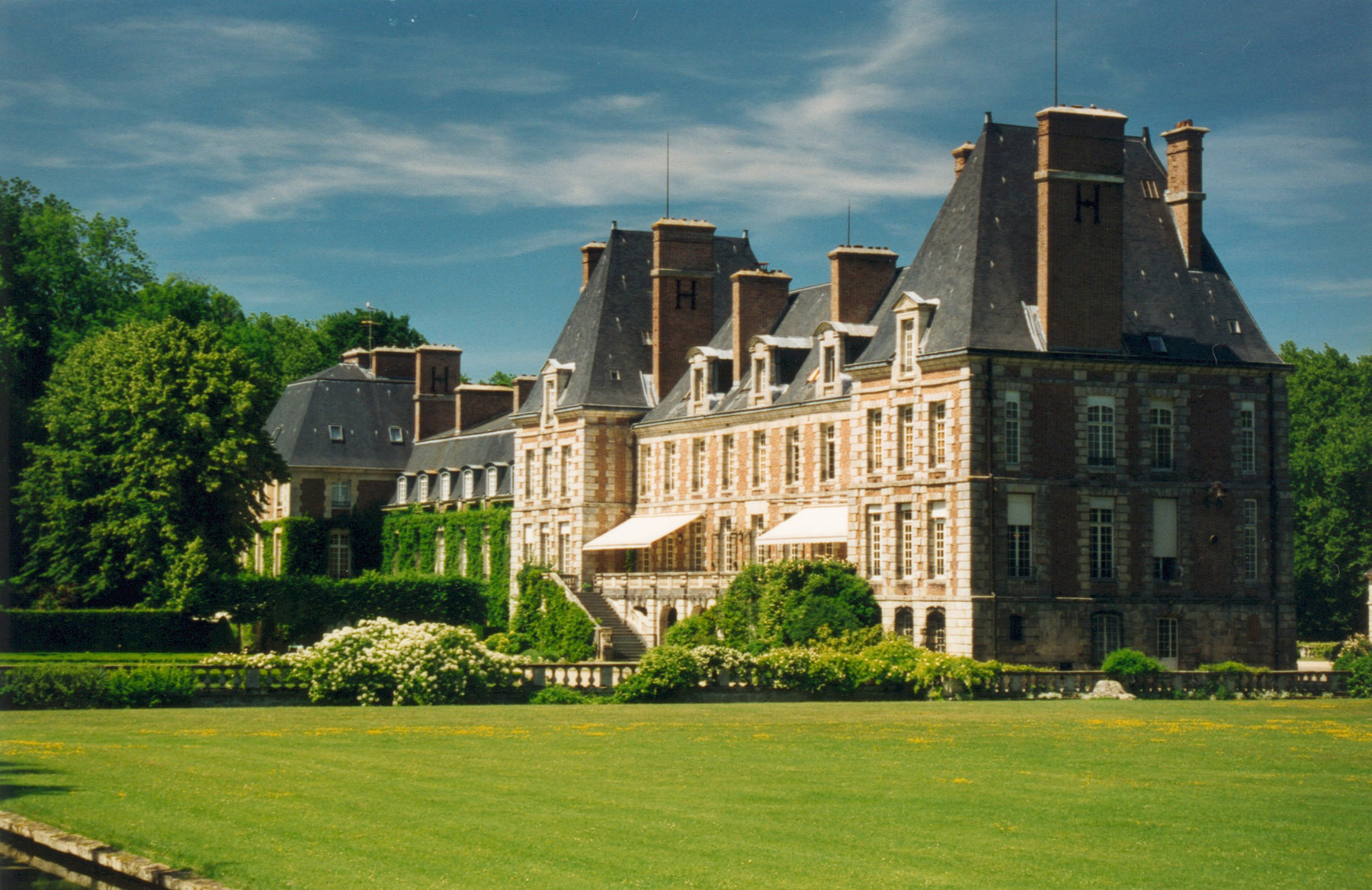 Château de Courances (Essonne, France) côté jardin